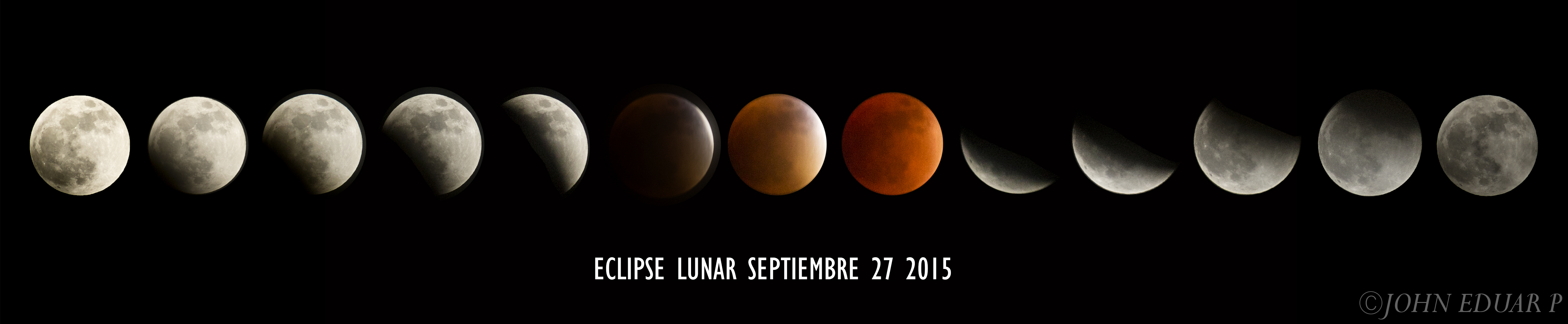 Secuencia del eclipse de luna de sangre del 27 de septiembre del 2015.